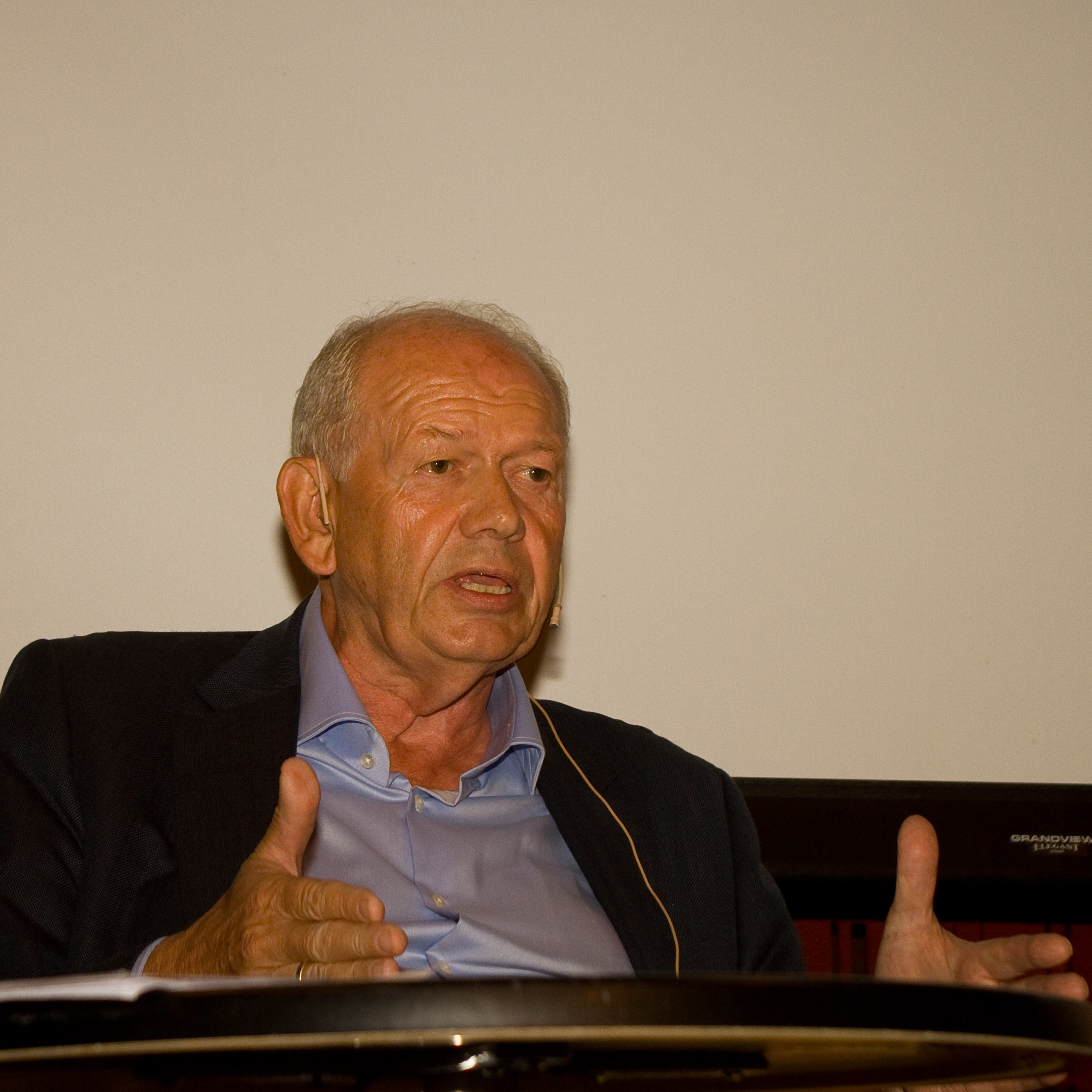 Egil Myklebust (født 1942 i Kvinnherad) er en norsk forretningsmann og industrileder.